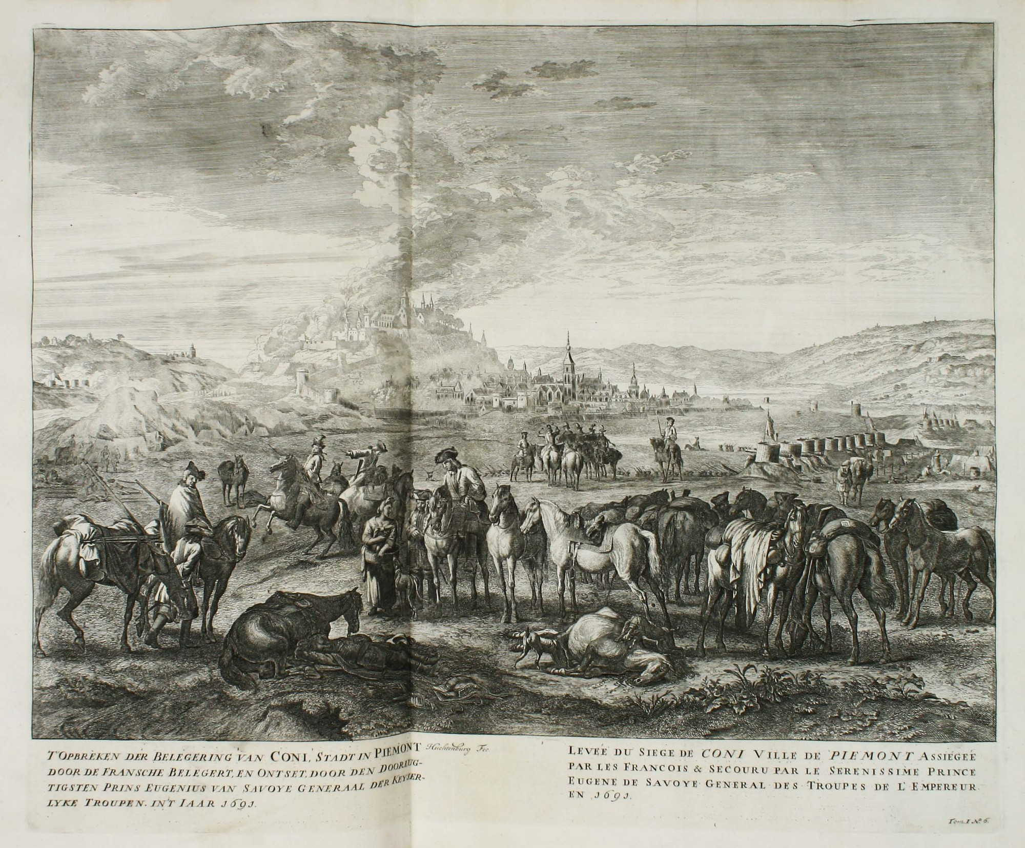 Die Feldzüge des Prinzen Eugen und des Herzogs v. Marlborough im Spanischen Erbfolgekrieg und den Türkenfeldzügen.